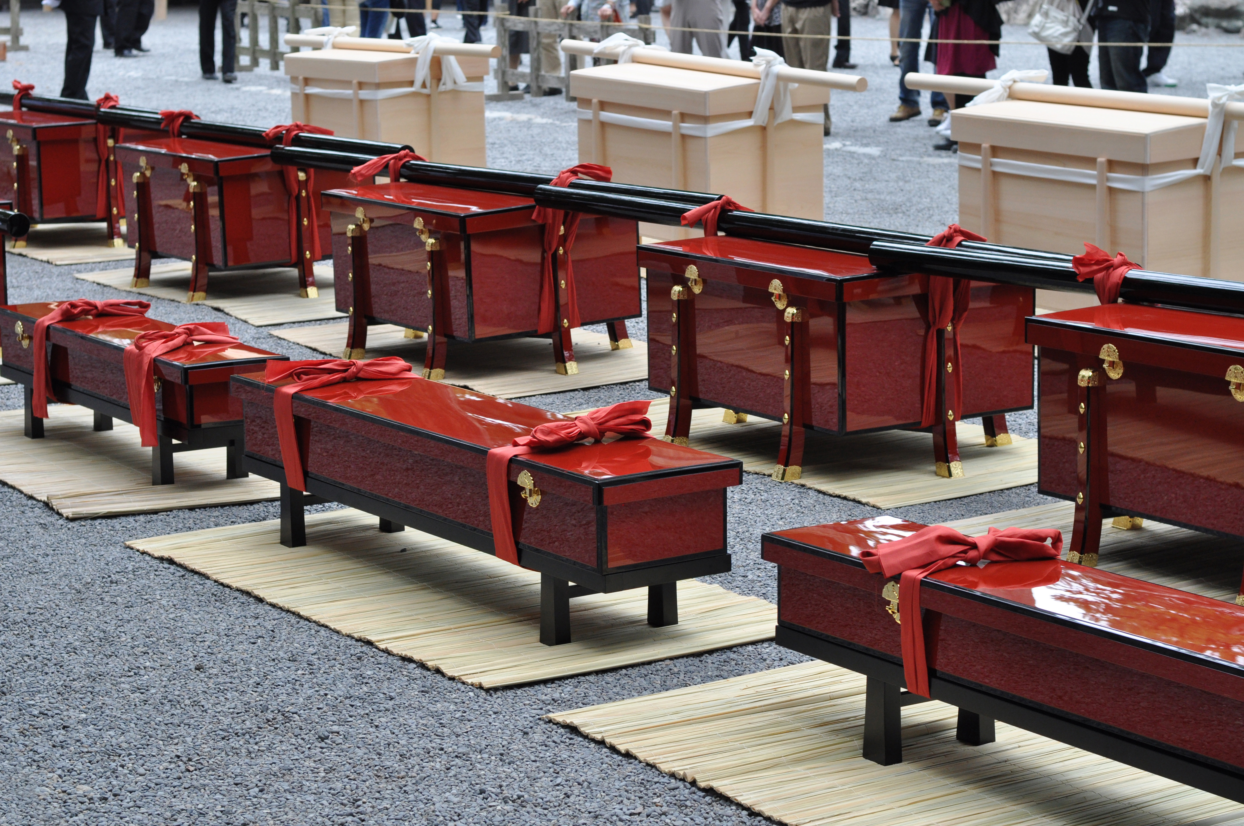 辛櫃（からひつ）